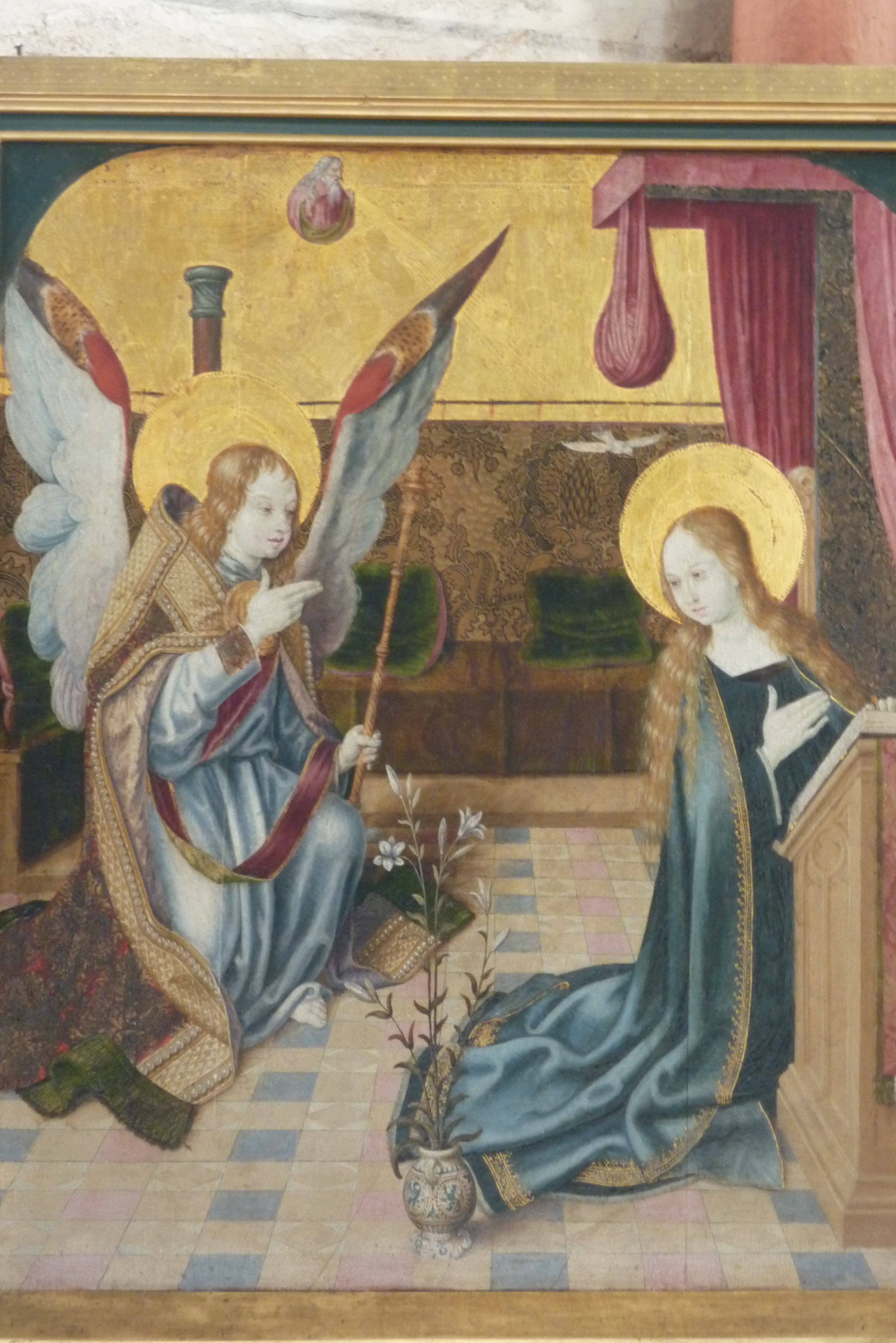 katholische Pfarrkirche St. Georg in Frauenberg, Tryptichon – außen